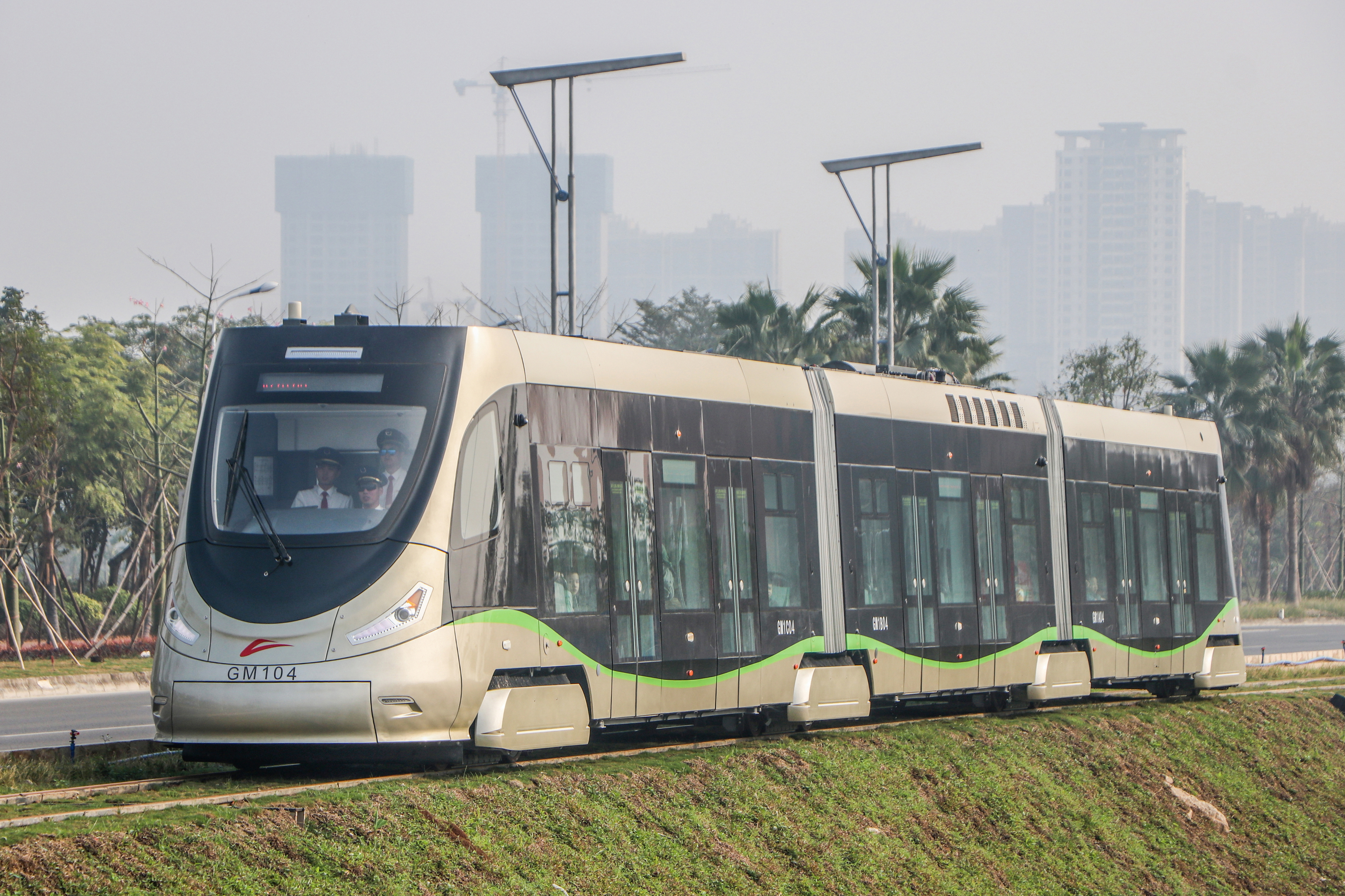 佛山高明有轨电车 104号车